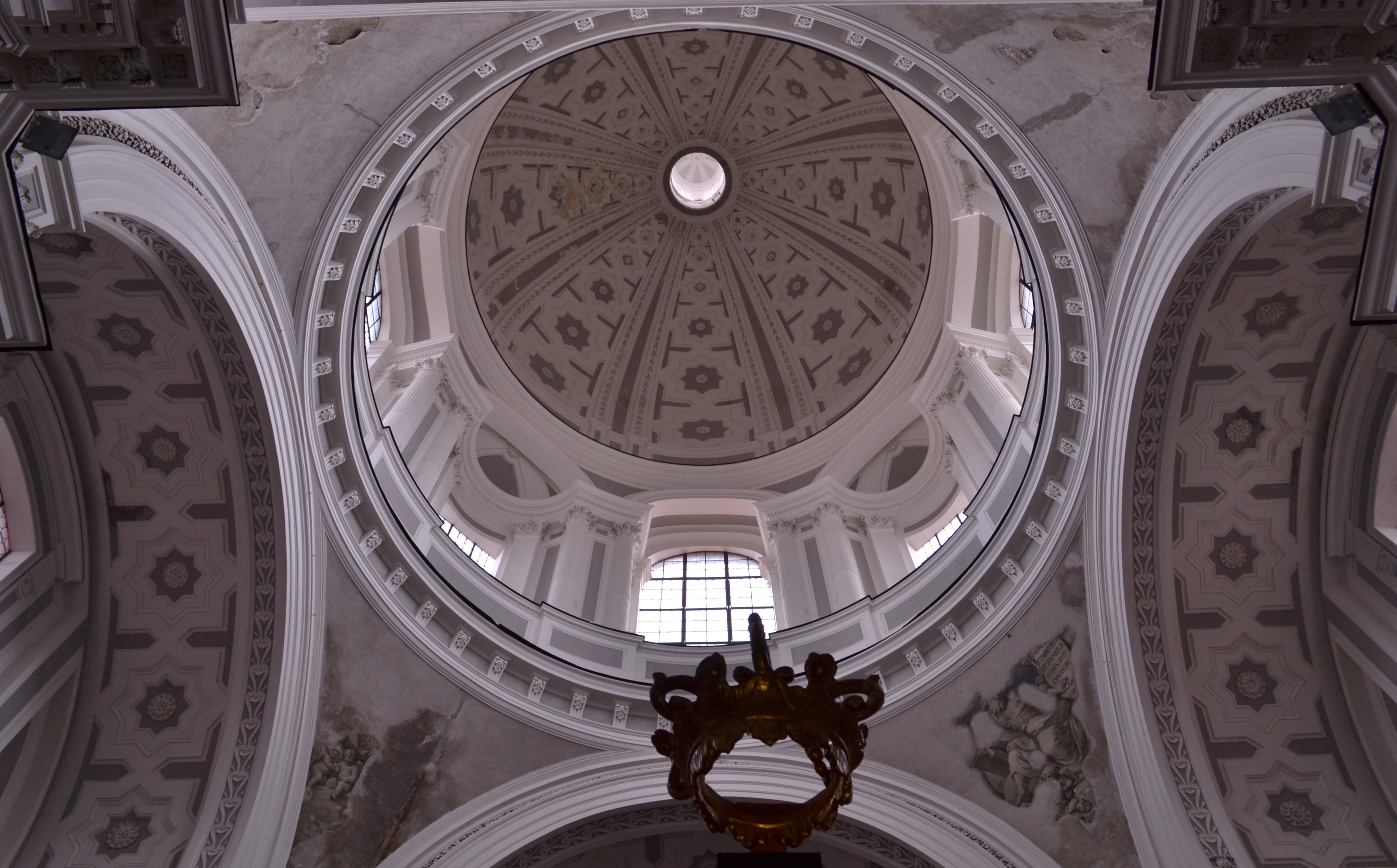 Cupola interna